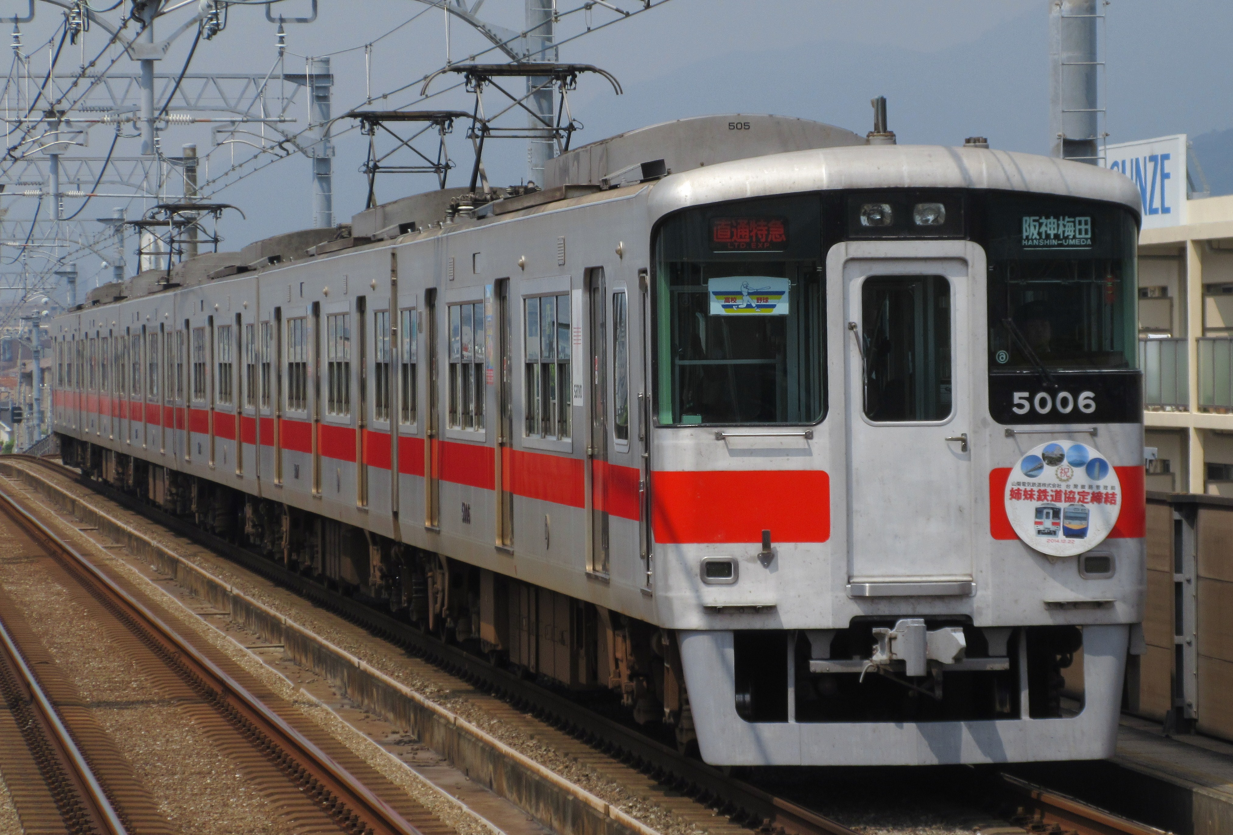 山陽電鉄5006編成 (香櫨園駅にて)